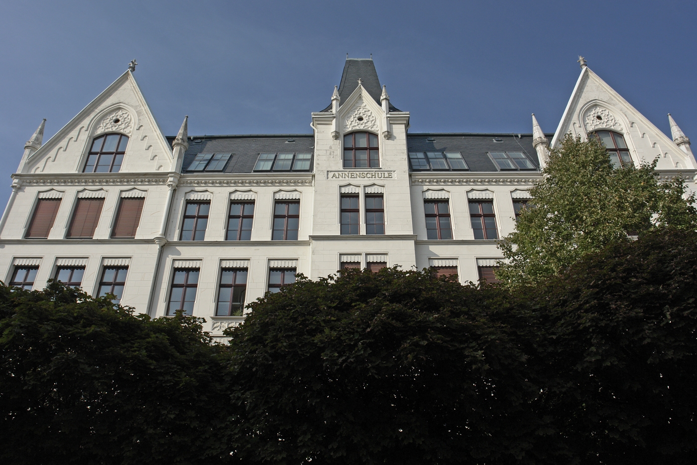 Description: Goerlitz, Annenschule Source: eigene Fotografie, Date:18.09.06, Photographer: Hans Peter Schaefer